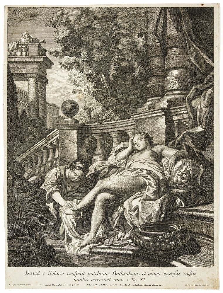 David beobachtet Bathseba beim Baden (nach Jean-François de Troy (1679-1752))